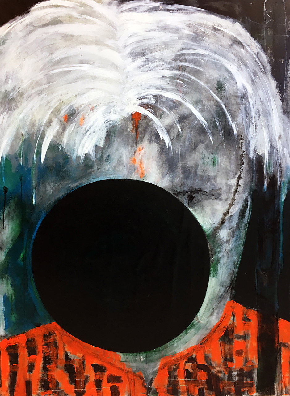 Battlefields of Cupiditas by Nina Staehli